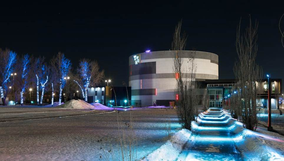 la TOHU